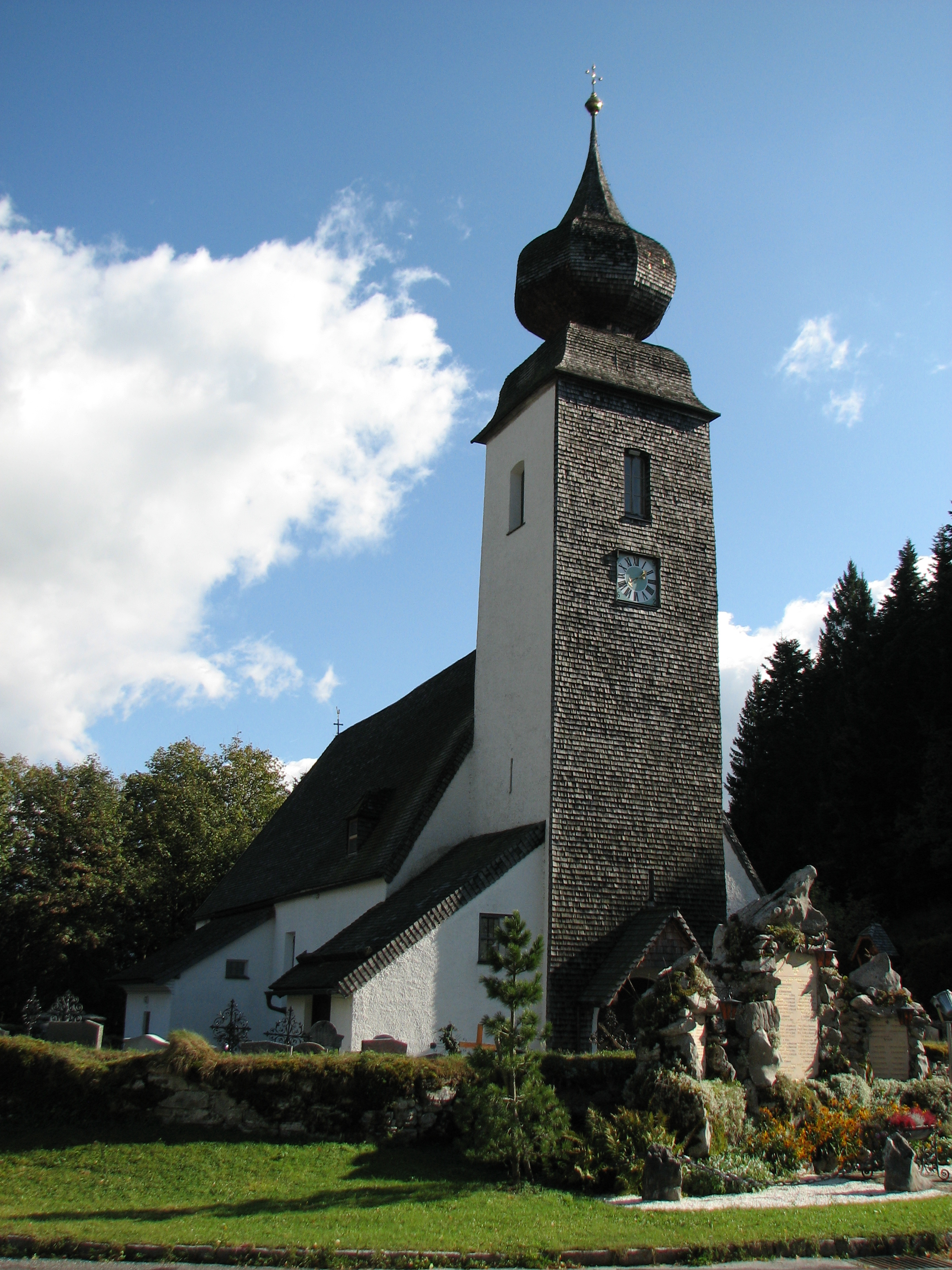 Kath. Pfarrkirche hl. Petrus und Paulus